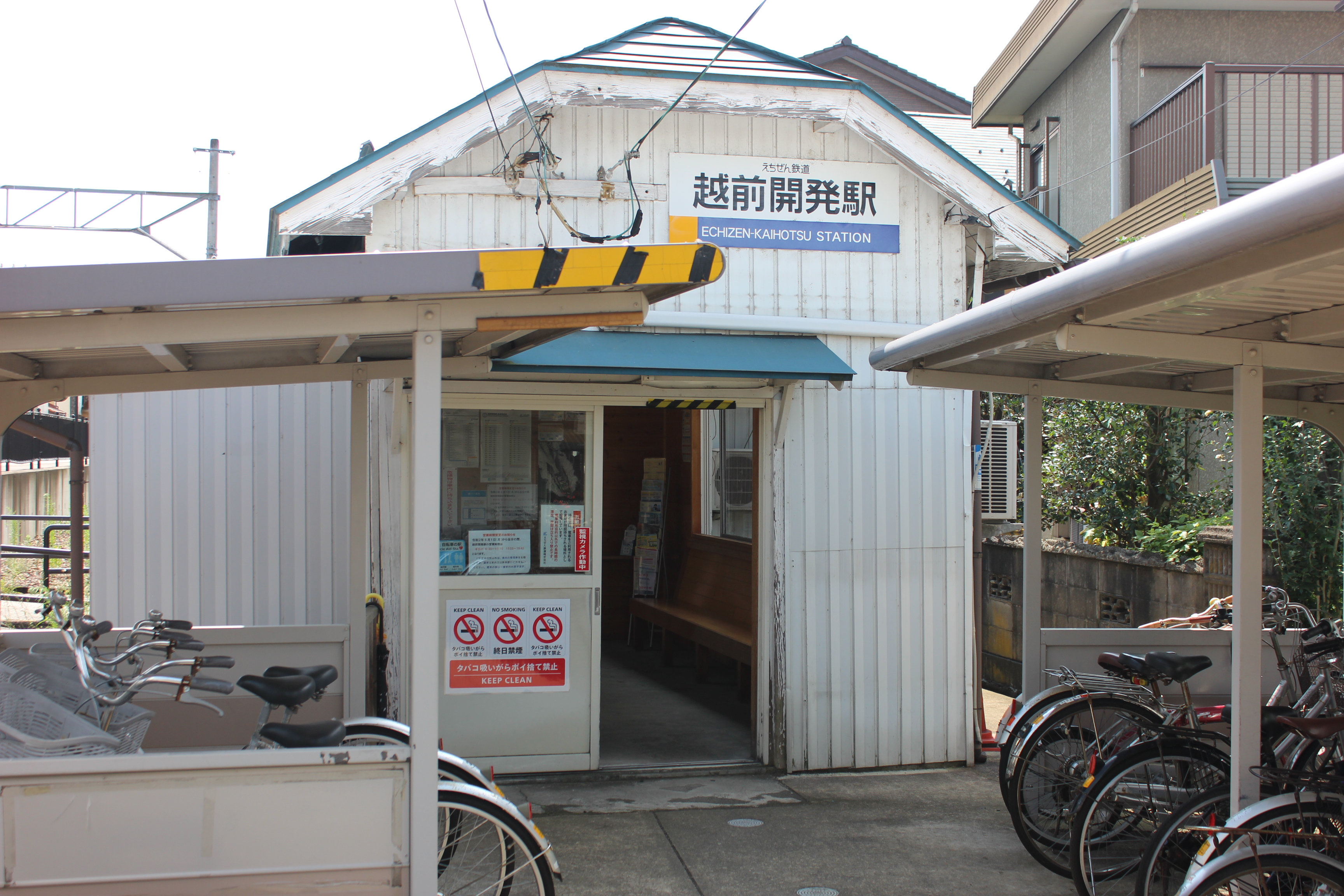 えちぜん鉄道勝山永平寺線越前開発駅